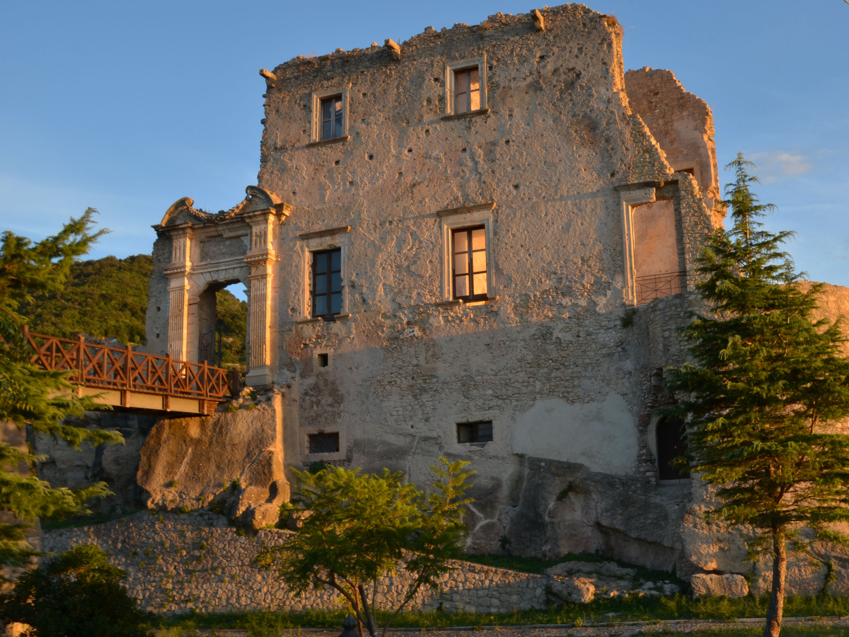 Castello della Valle This is a photo of a monument which is part of cultural heritage of Italy.